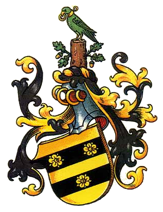 Wappen der von Eickstedt